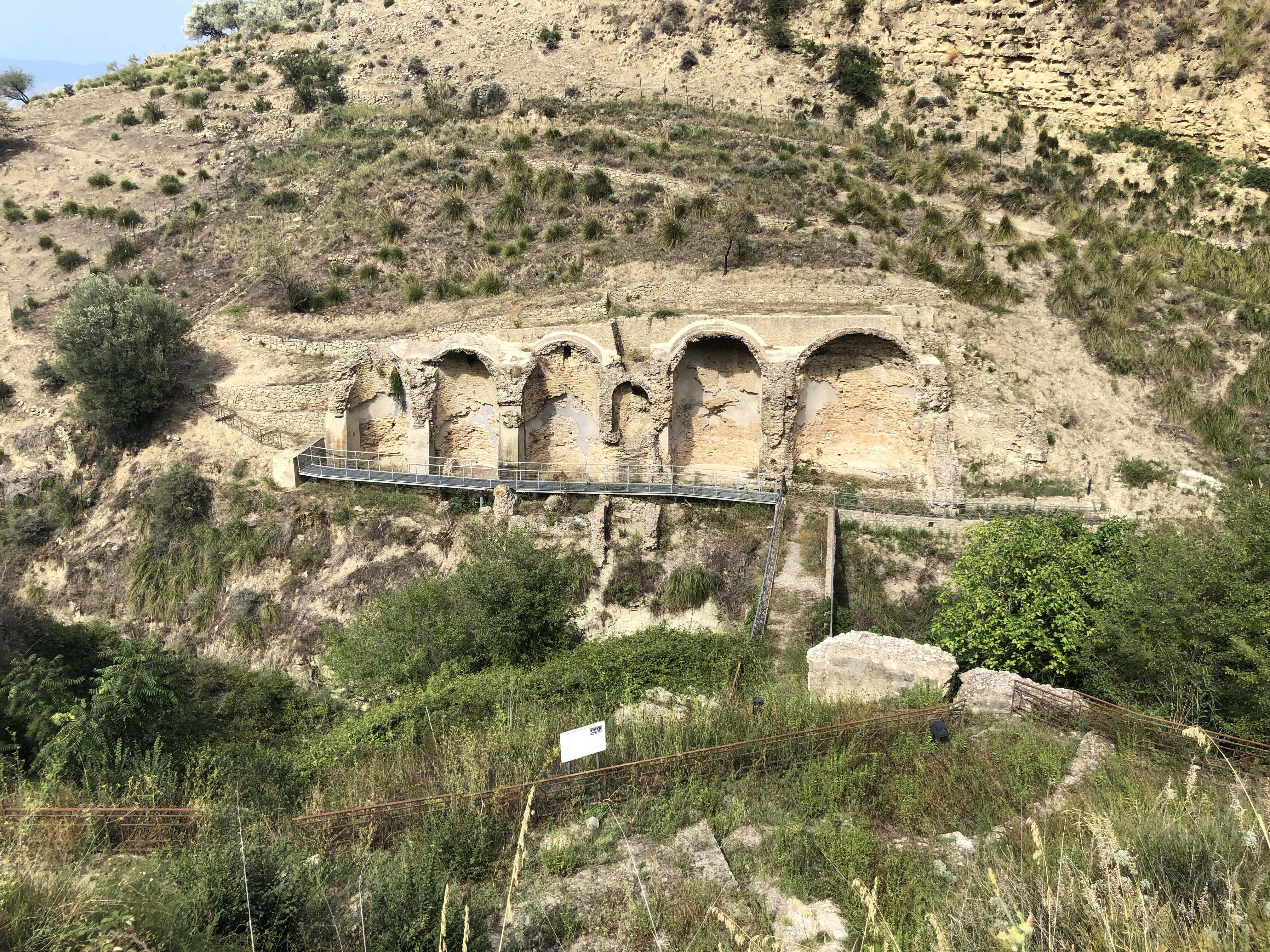 Ninfeo romano di Centuripe